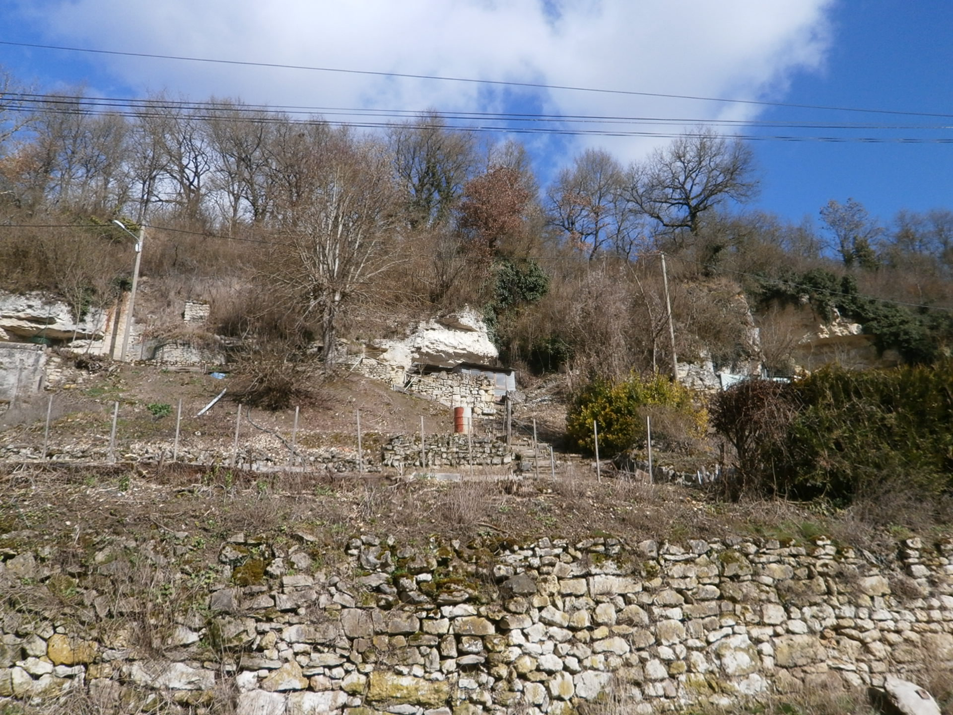 Habitats troglodytiques